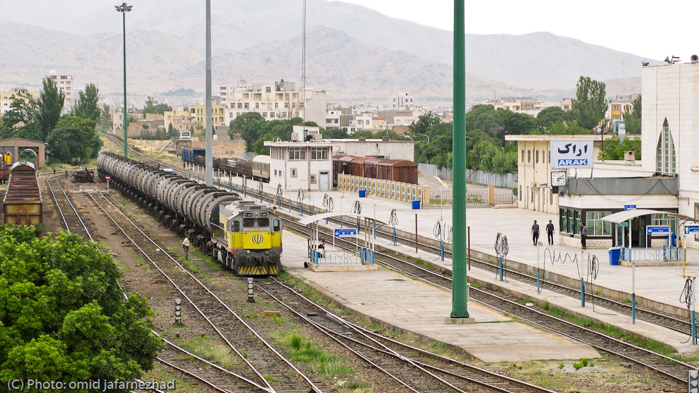 ایستگاه راه آهن اراک